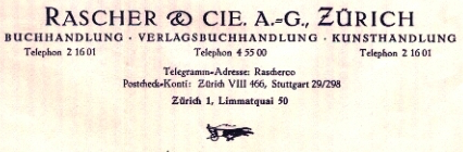 Briefkopf des Rascher Verlags in Zürich